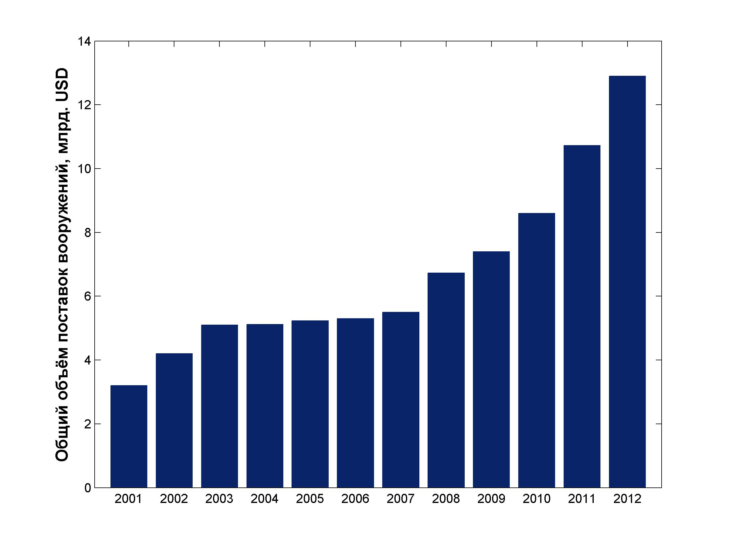 Рособоронэкспорт - Общий объём поставок вооружений (млрд. USD) за 2001-2011 гг.